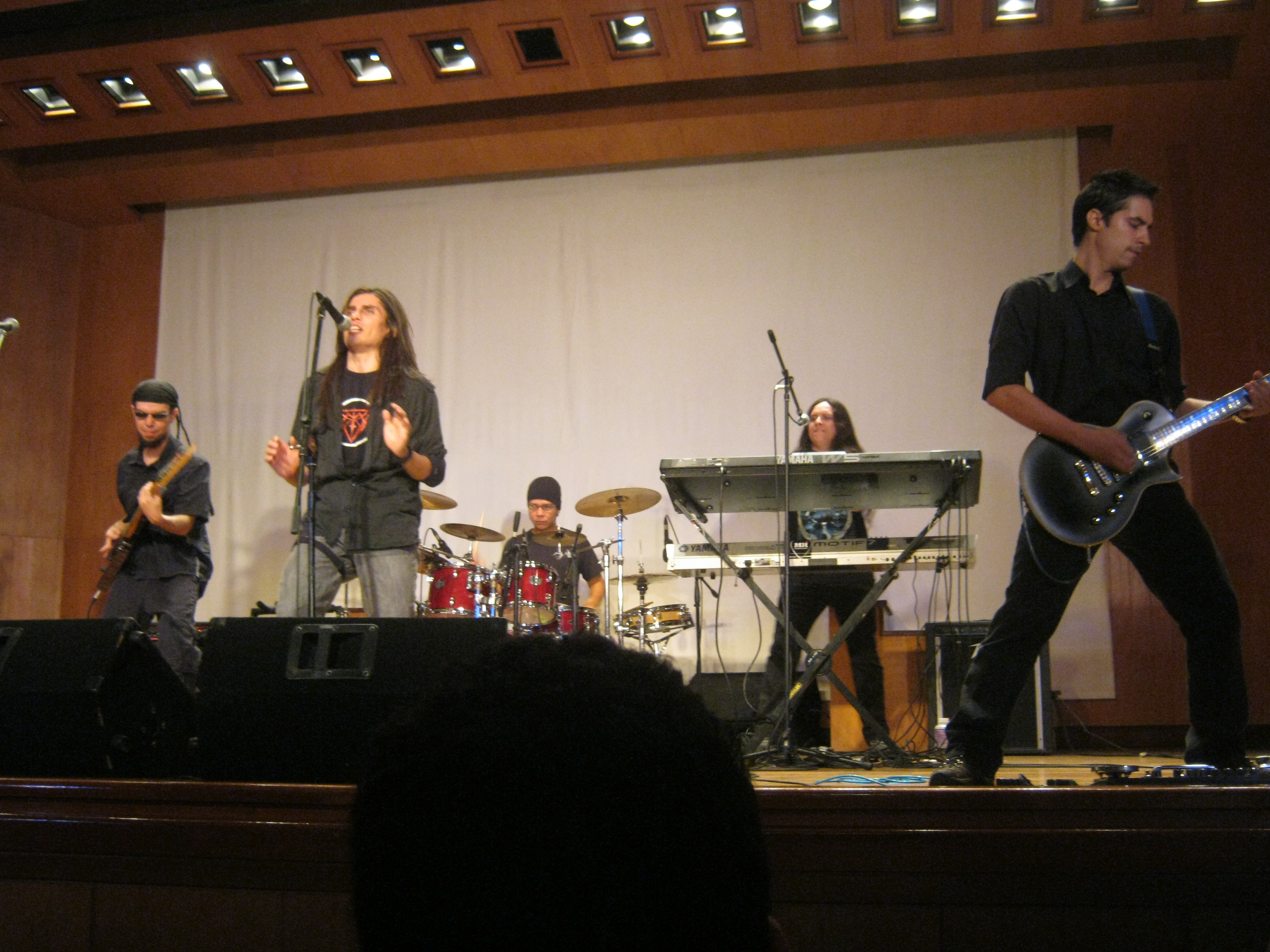 Concierto en conmemoración de los 15 años de la banda caleña de metal progresivo Legend Maker